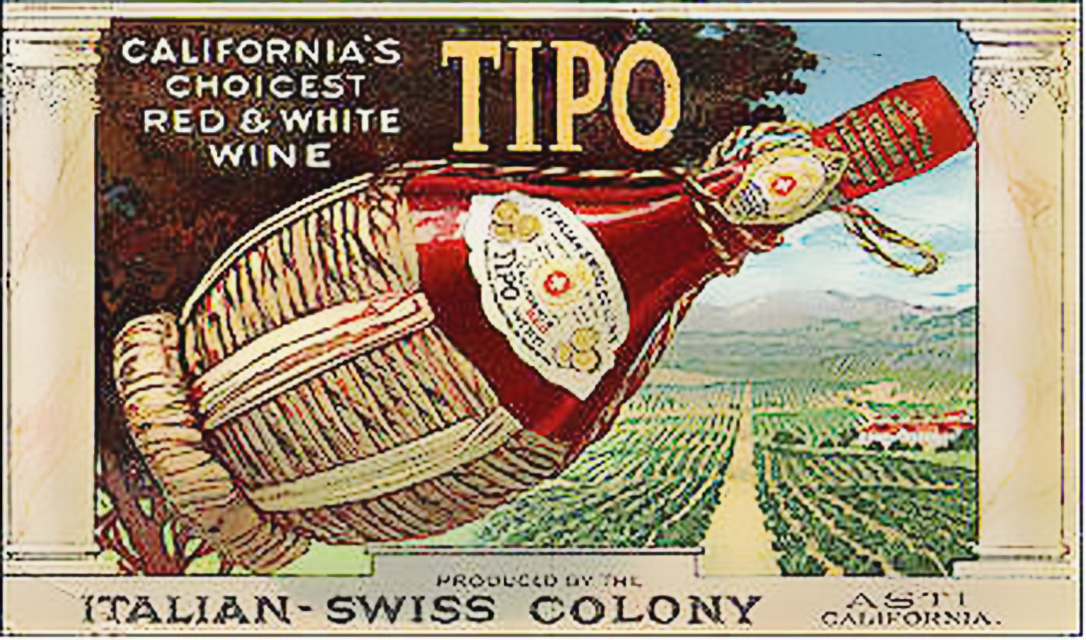 Vin produit à Asti Californie au début du XXe siècle